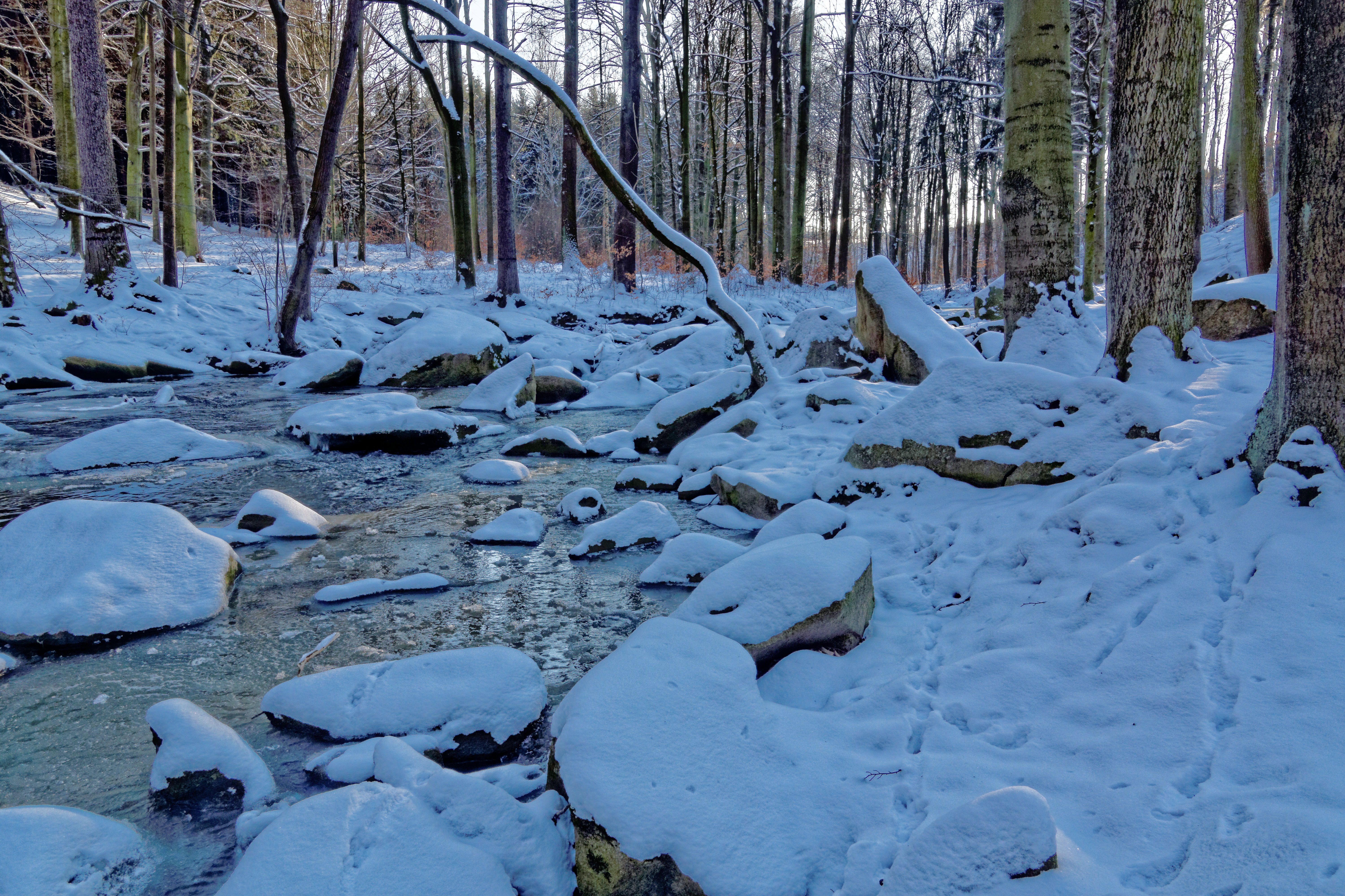 Spree mit den sogenannten Herkulessteinen